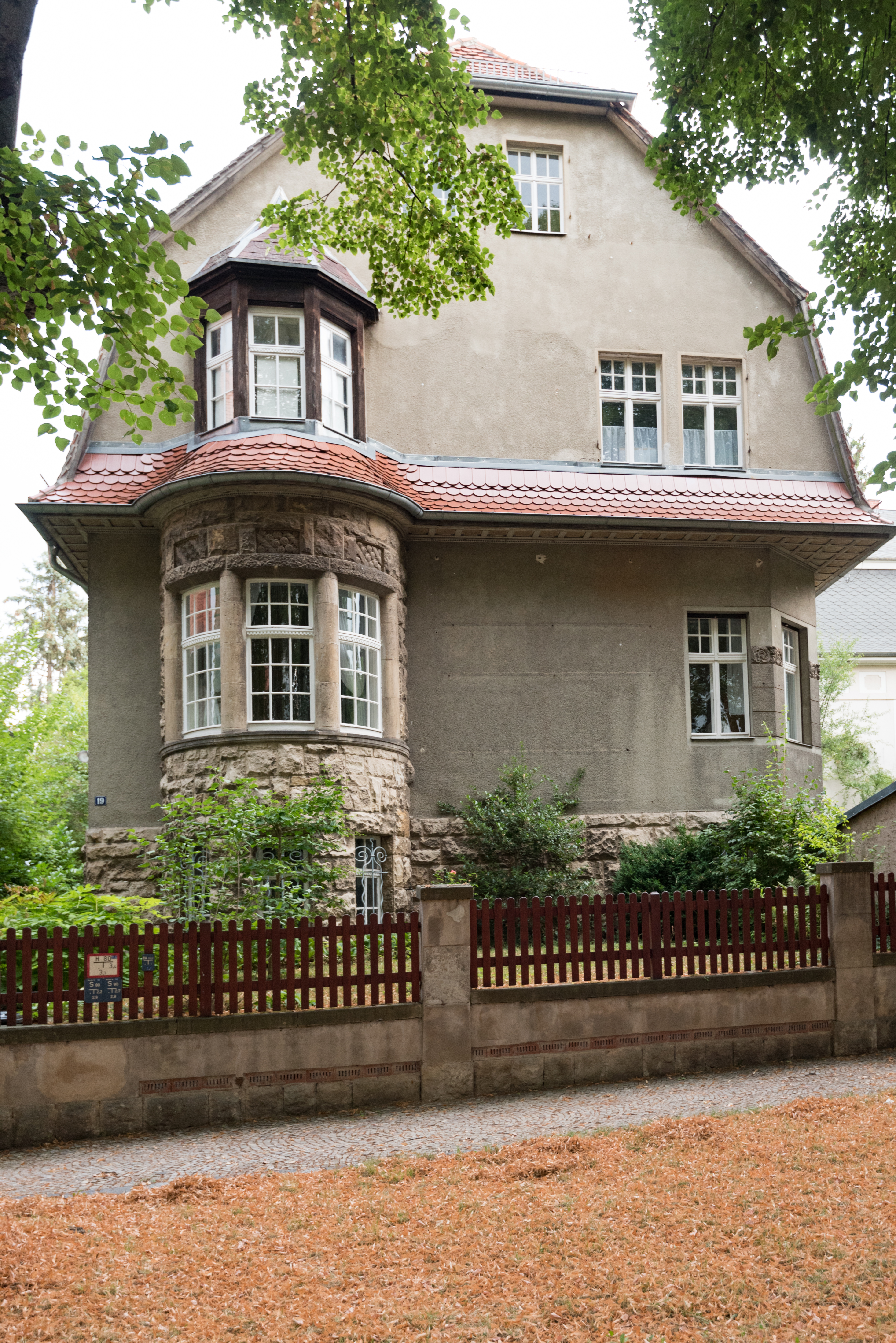 Naumburg (Saale), Buchholzstraße 19